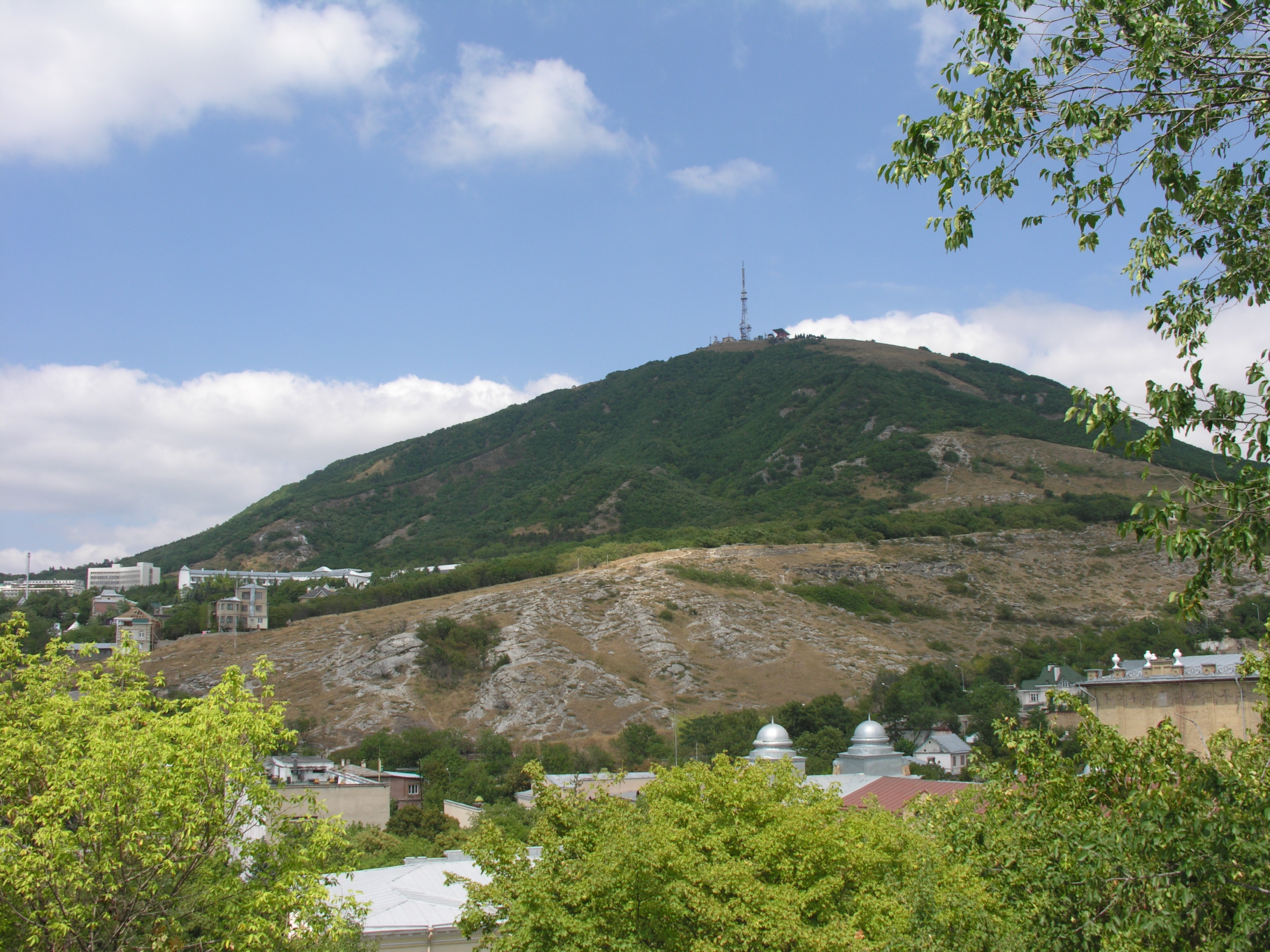 Гора Машук